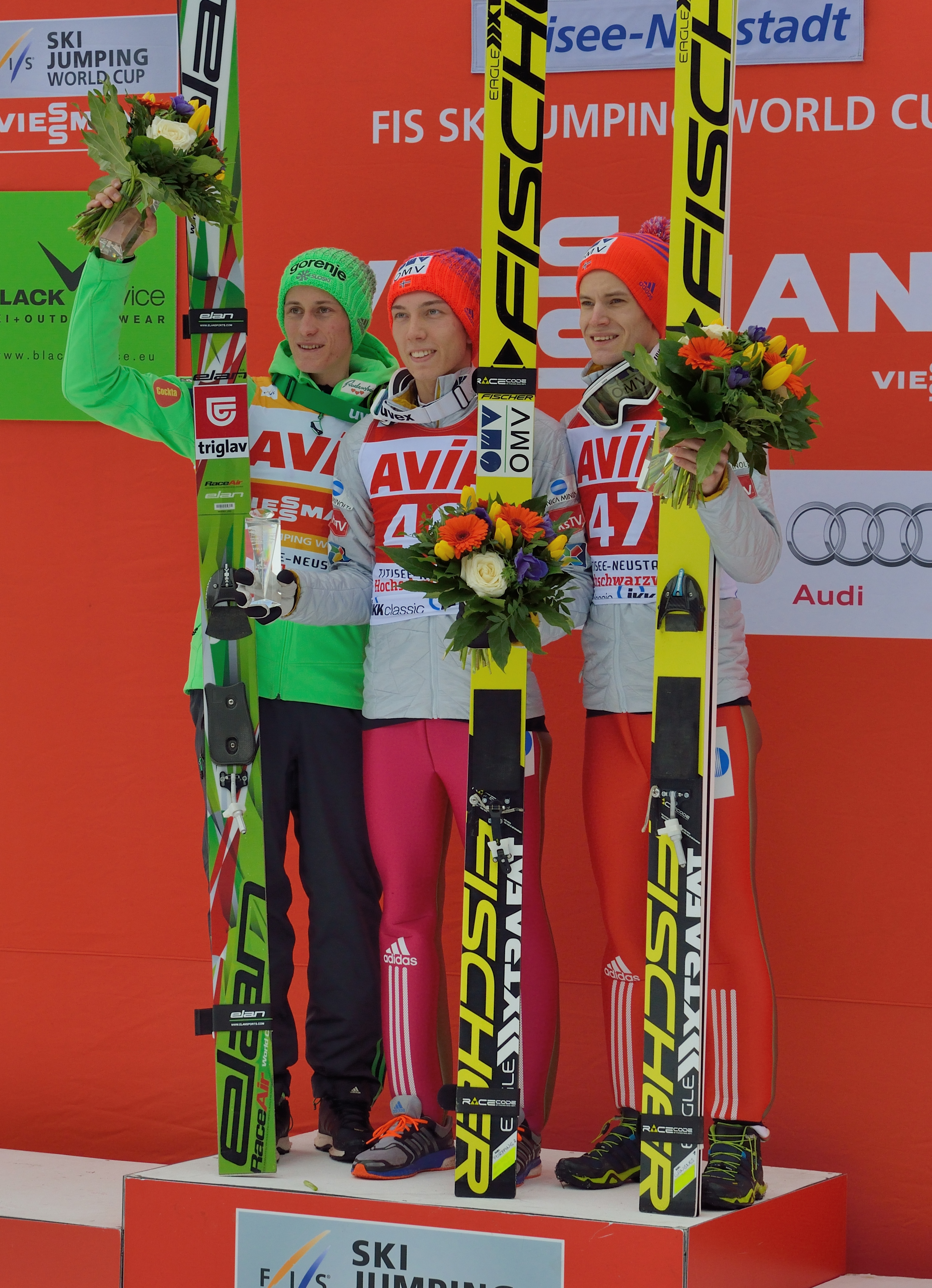 FIS Ski Weltcup Titisee-Neustadt 2016: Siegerehrung